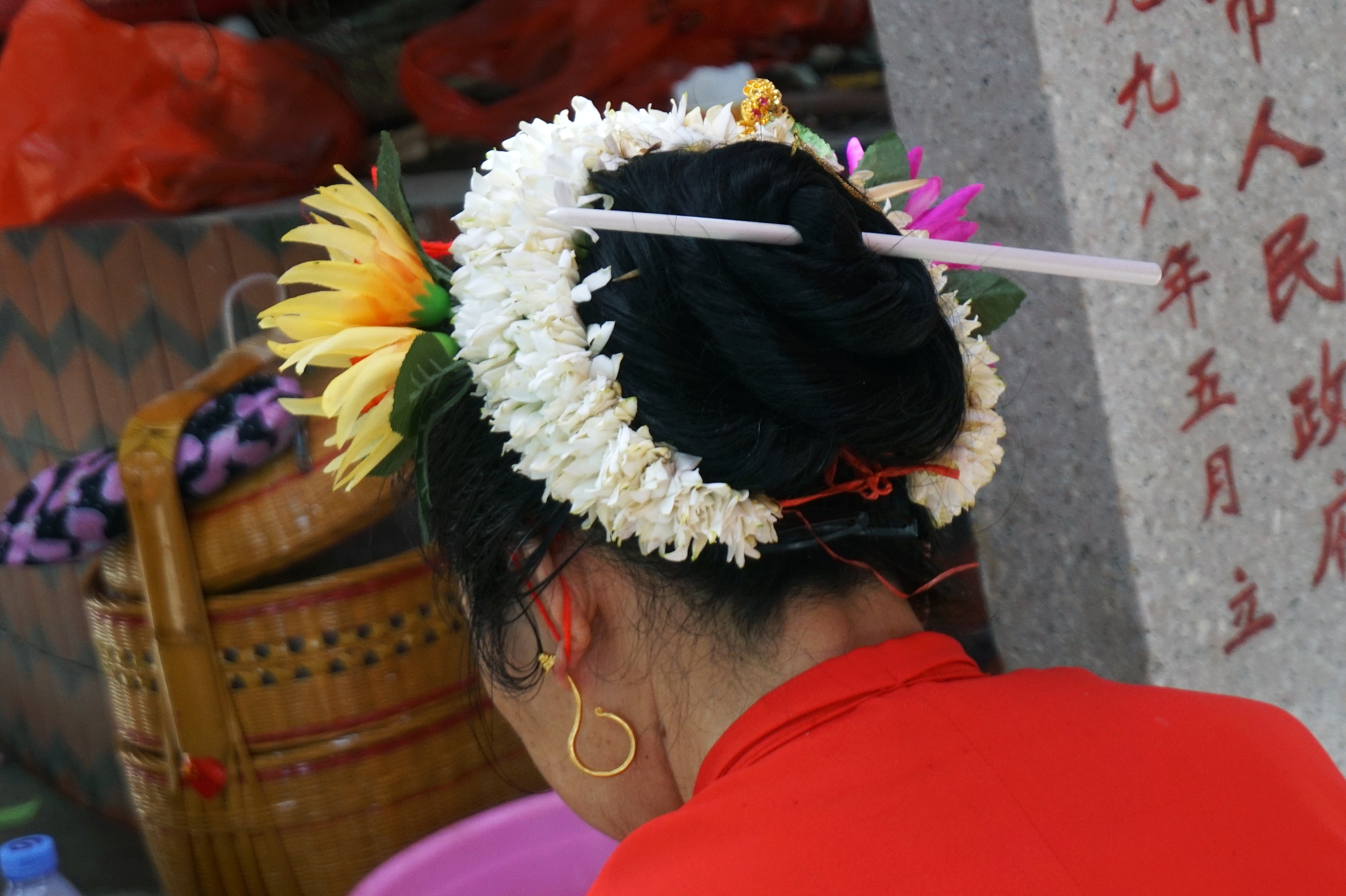 泉州蟳埔女“簪花围”。